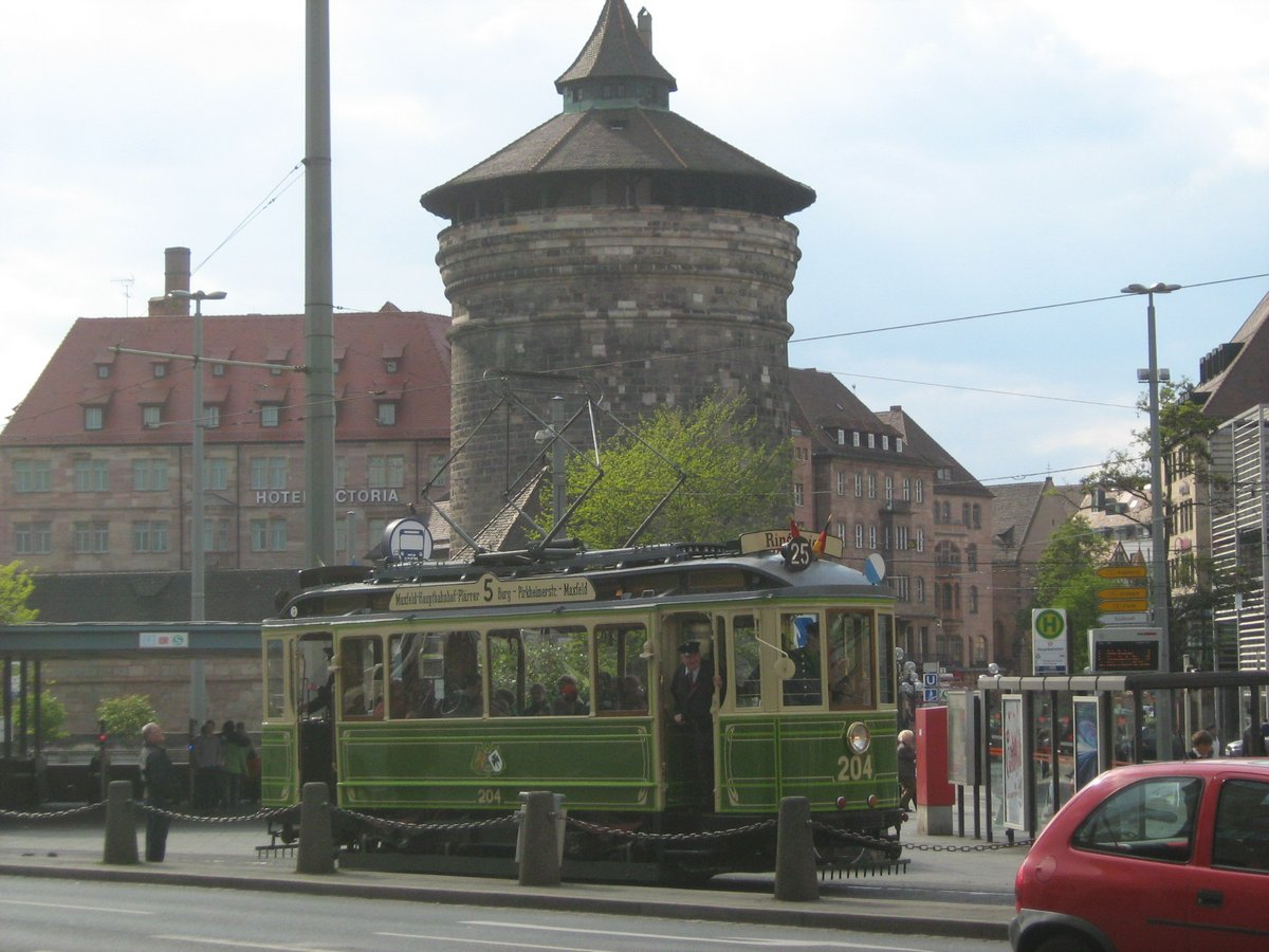 Nürnberger Triebwagen 204 am Hauptbahnhof